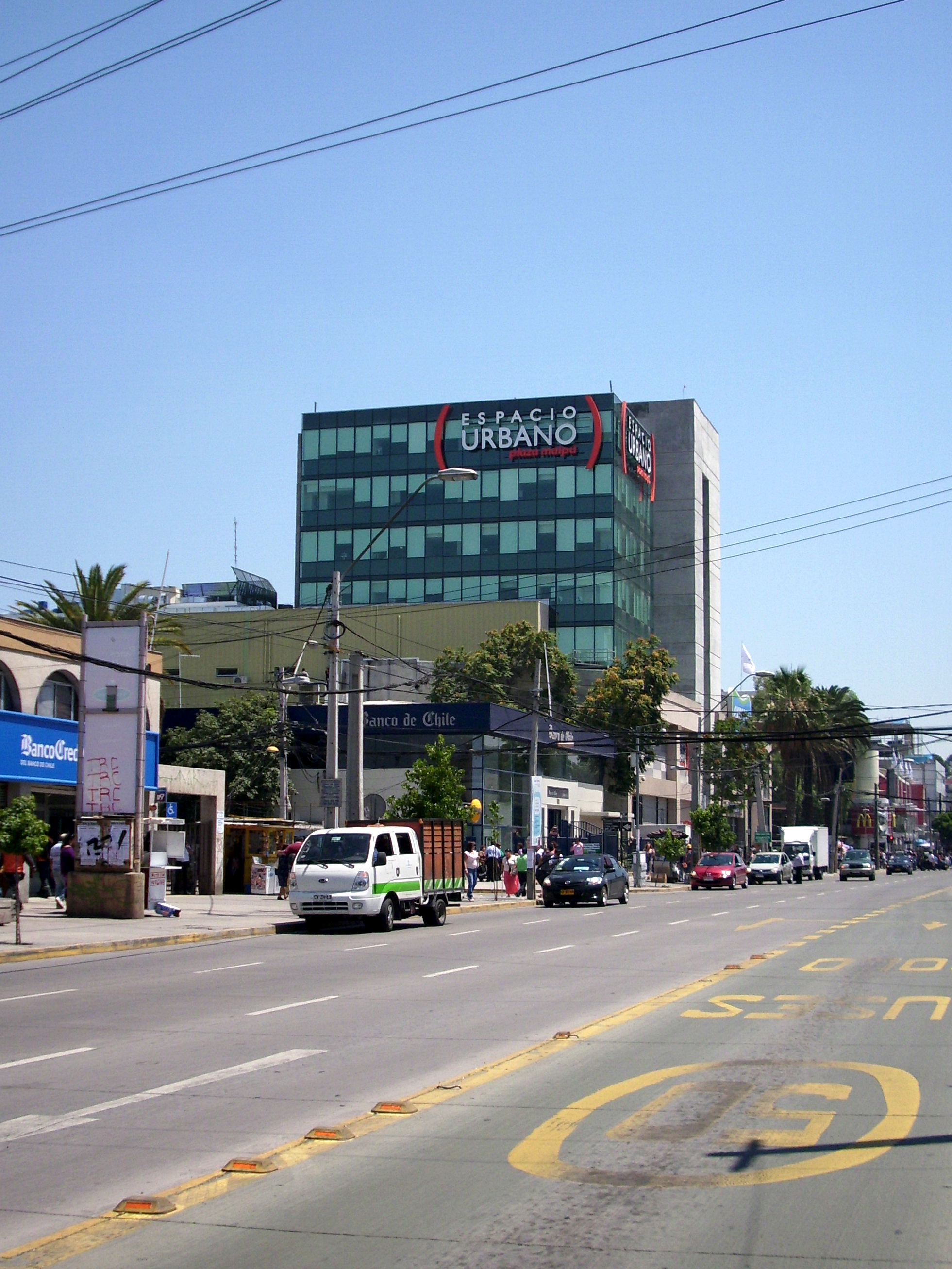 El centro comercial Espacio Urbano Plaza Maipú visto desde el corredor Pajaritos Sur. Maipú, Santiago de Chile, 21 de diciembre de 2012.